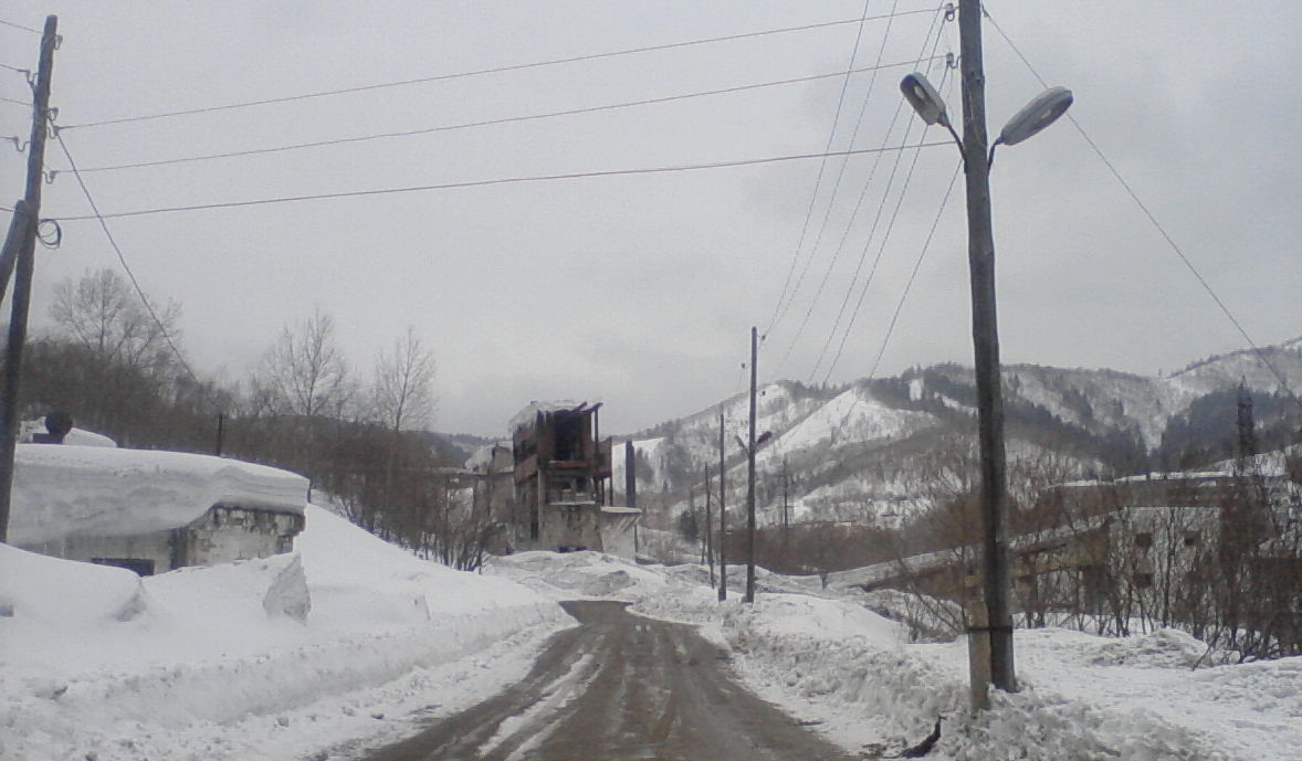 Вид на шахту "Синегорская" со въезда в Синегорск